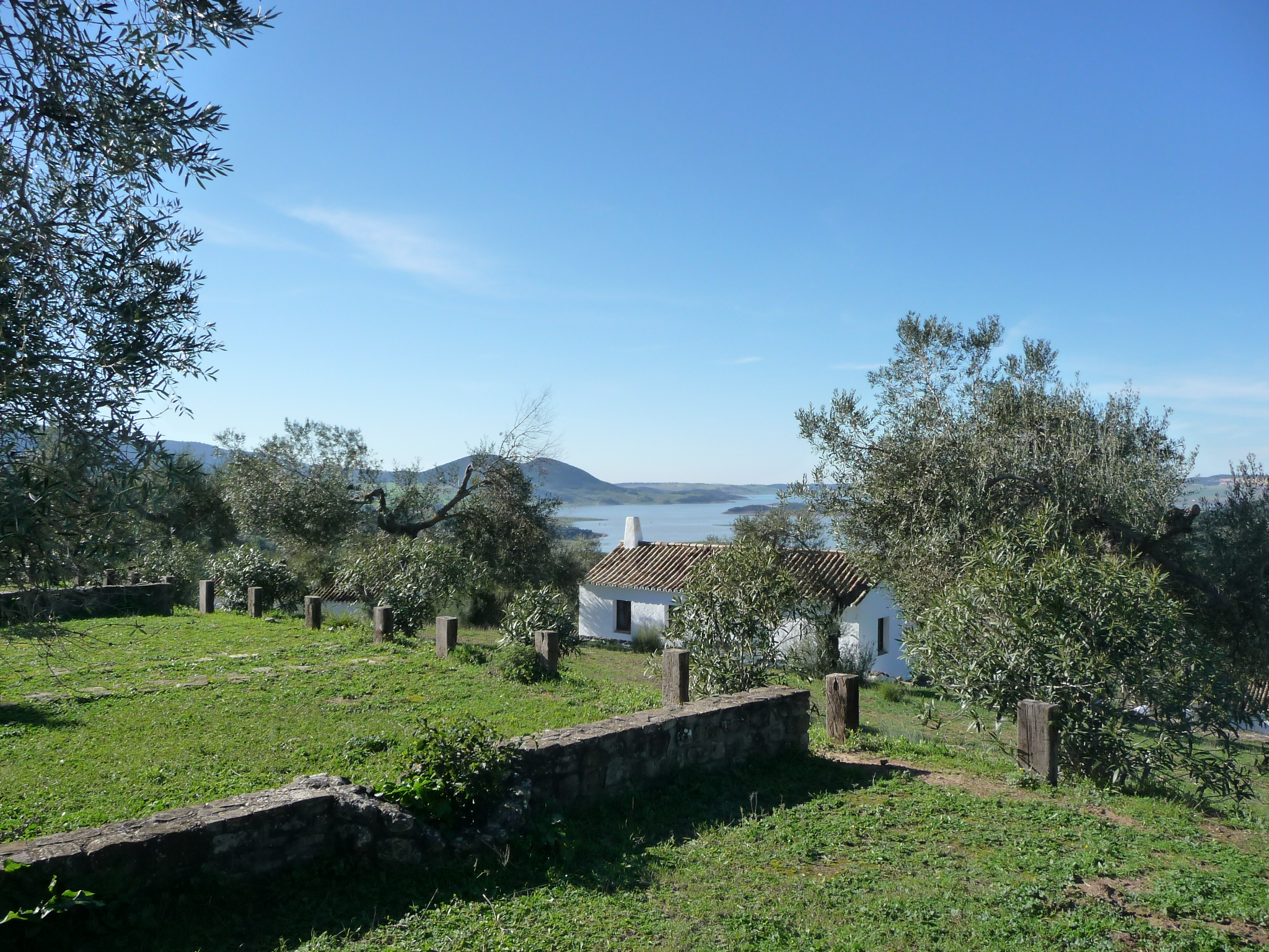 TajoDelAguila-P1060313.JPG